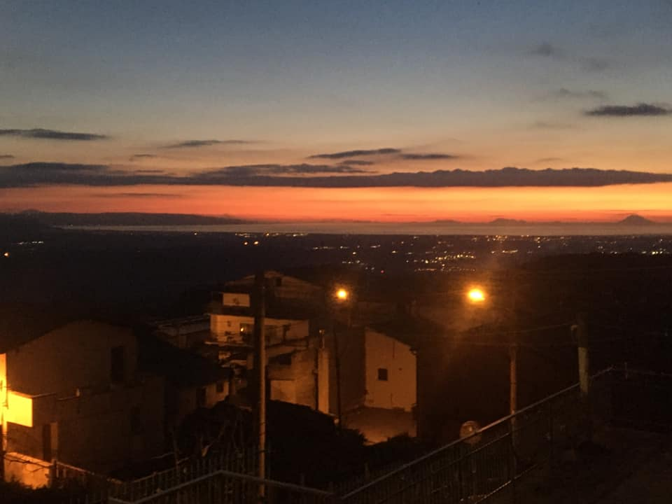 Tramonto